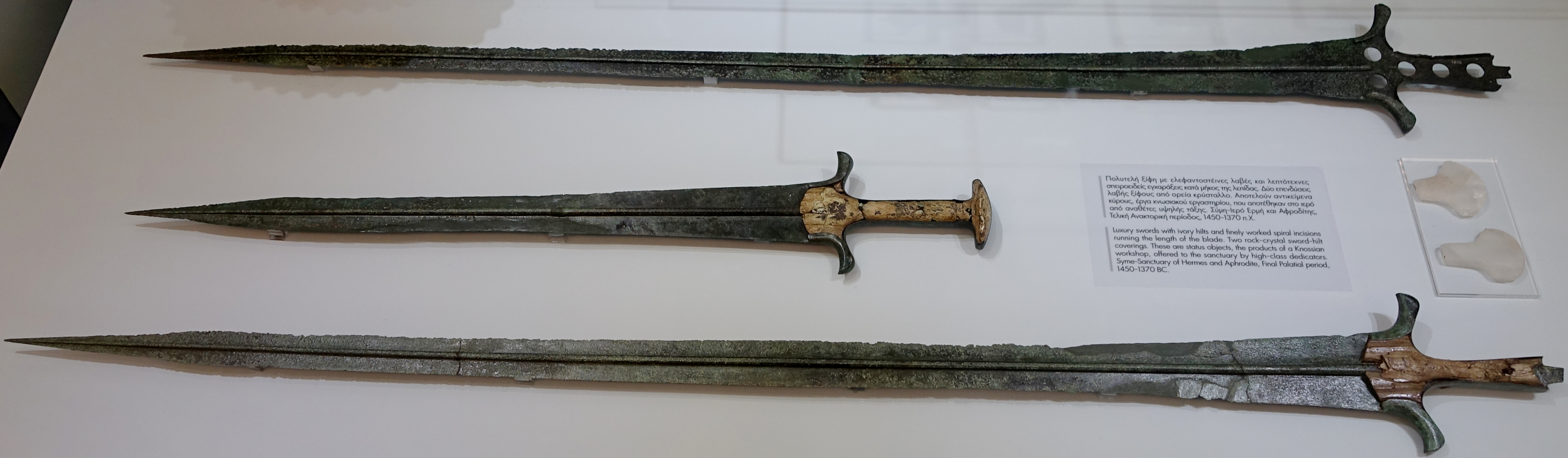 Luxuriöse Schwerter mit Elfenbeingriffen (dritte Palastzeit, 1450–1370 v. Chr.), gefunden im Heiligtum des Hermes und der Aphrodite bei Symi, Archäologisches Museum von Iraklio, Kreta, Griechenland